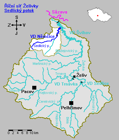 Říční síť Želivky - Sedlický potok